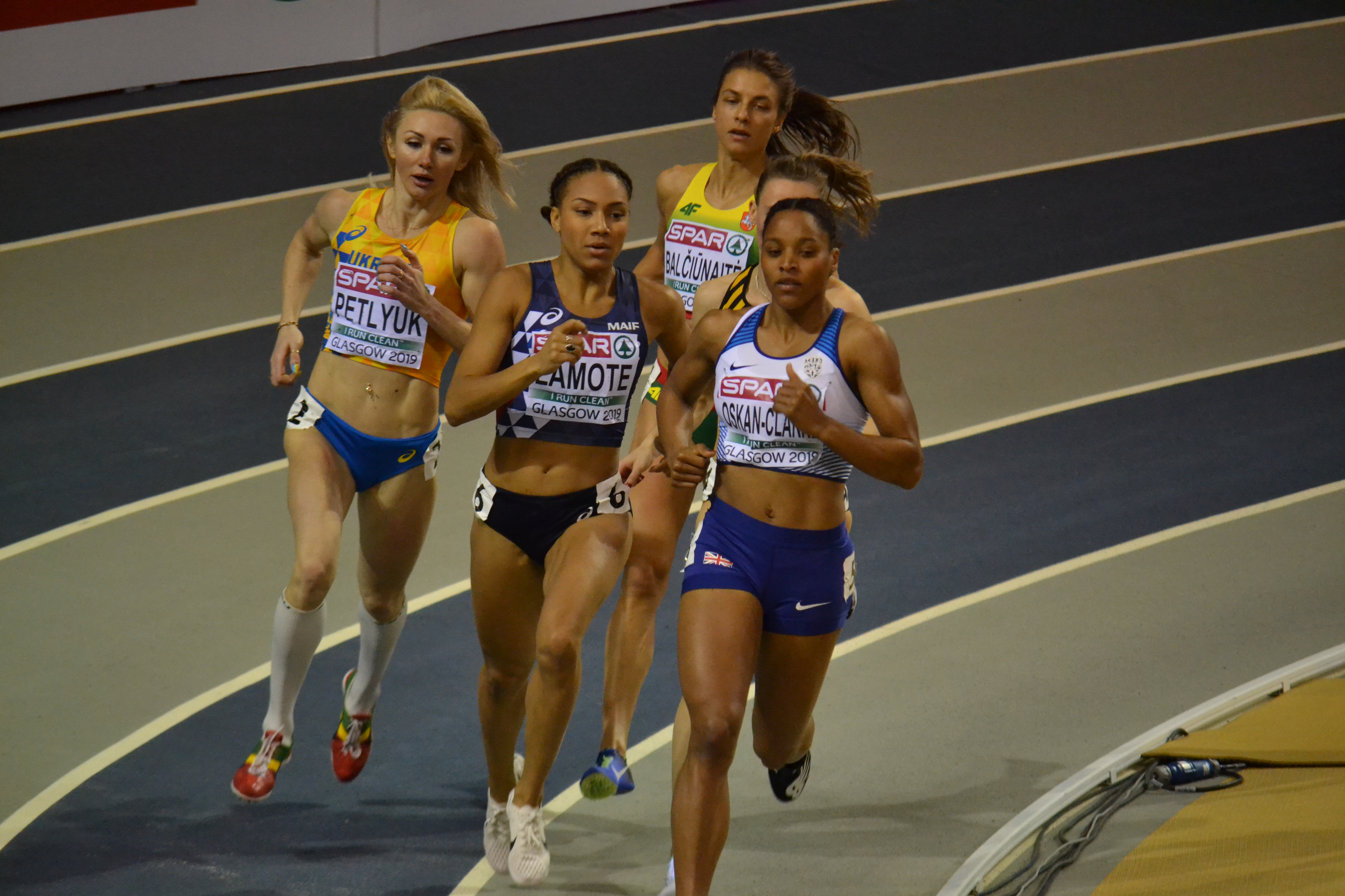 Womens 800m